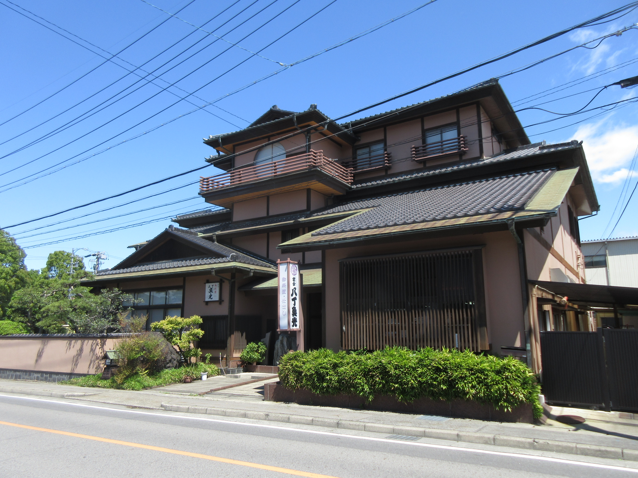 八丁魚光（岡崎市八帖町）